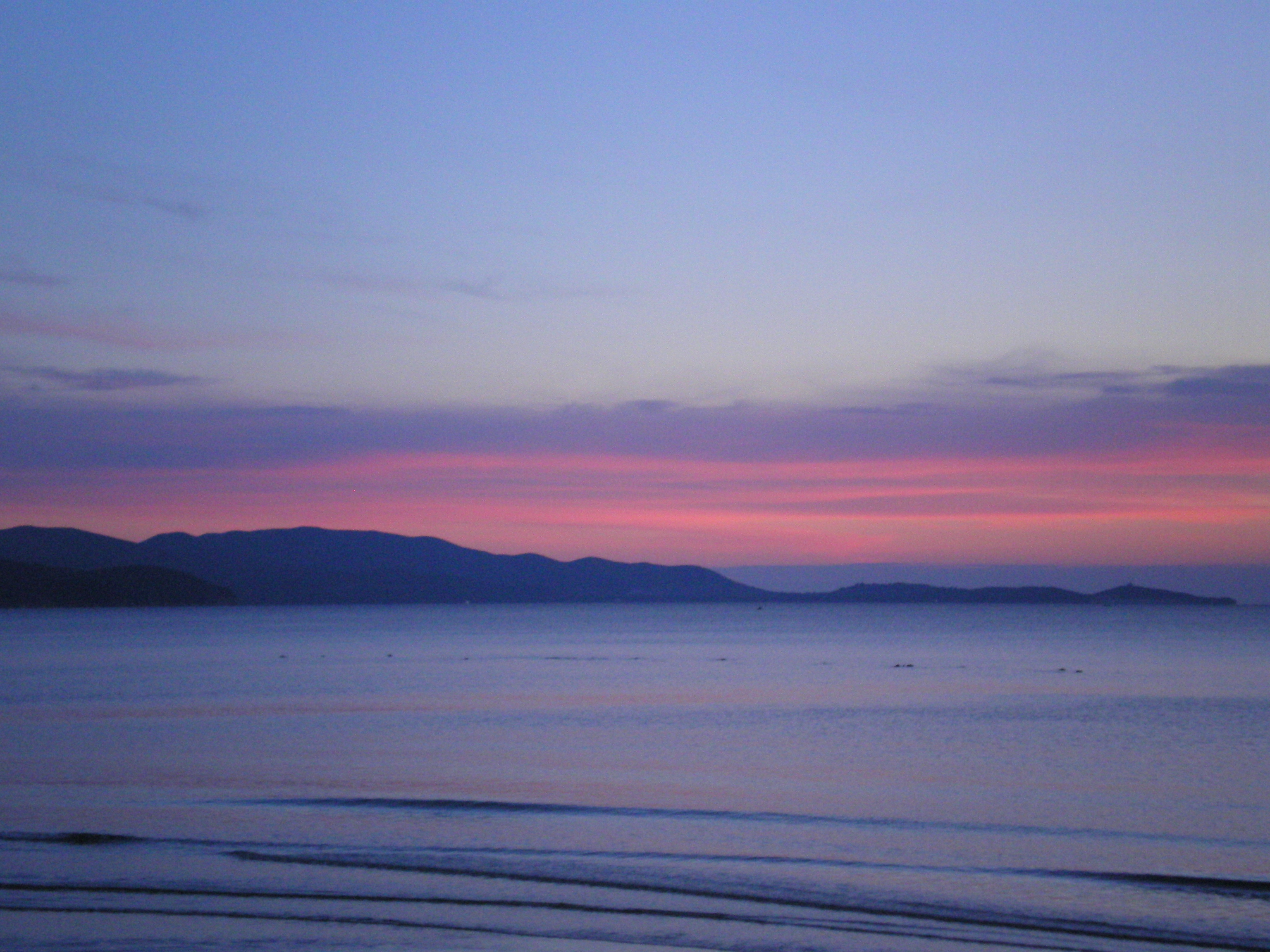 Colori del Cielo su Punta Ala, da Follonica